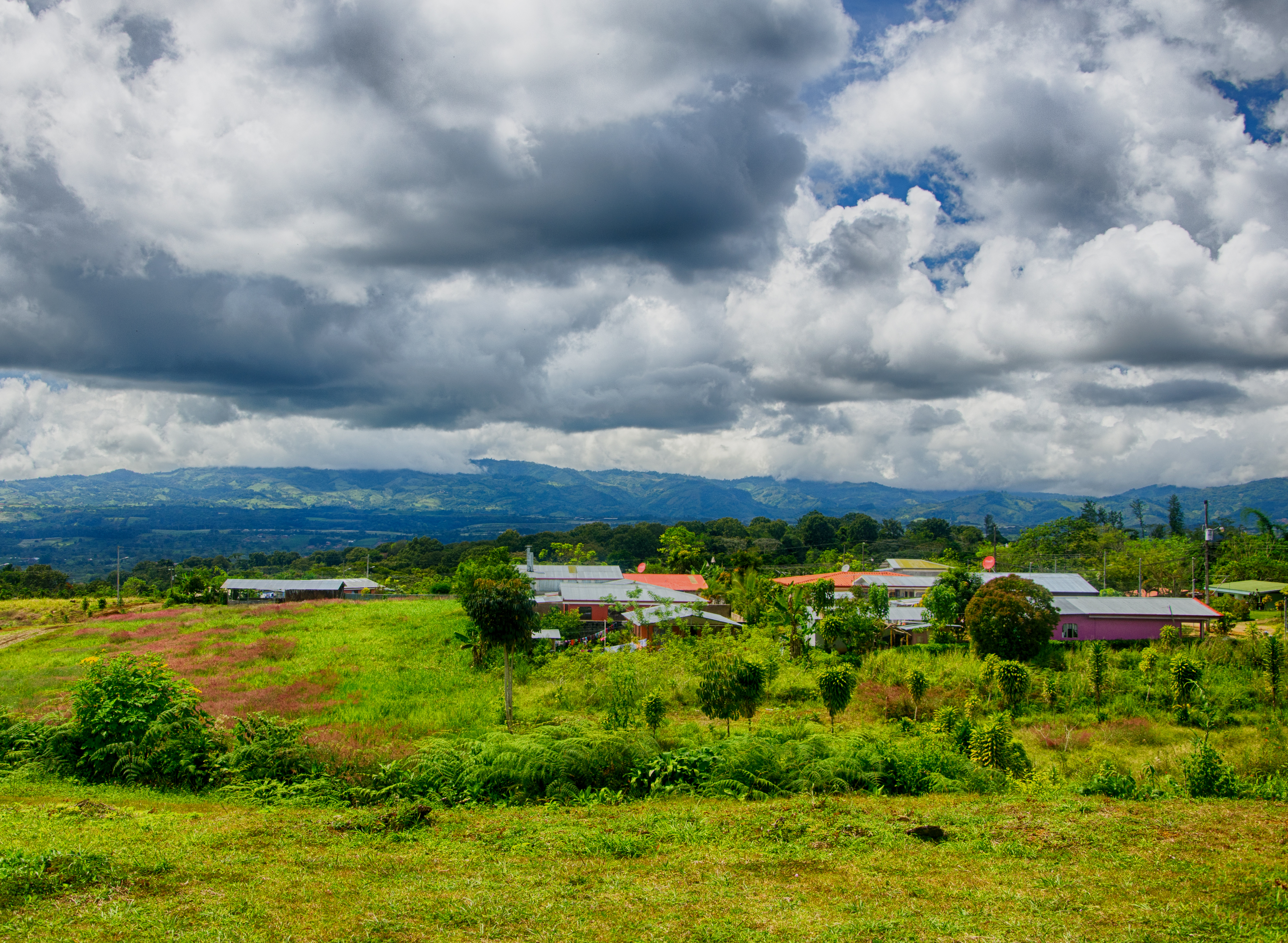 View near San Isidro del General